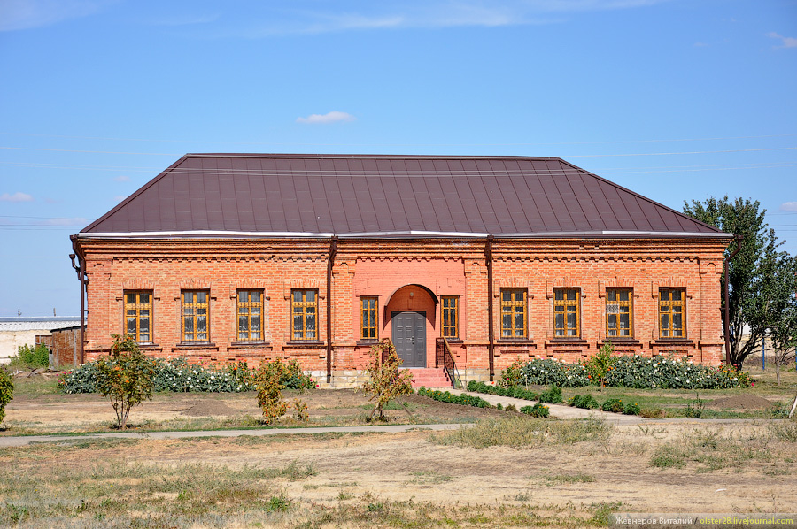 Свято-Никольский монастырь, посёлок Монастырский, Саратовская область